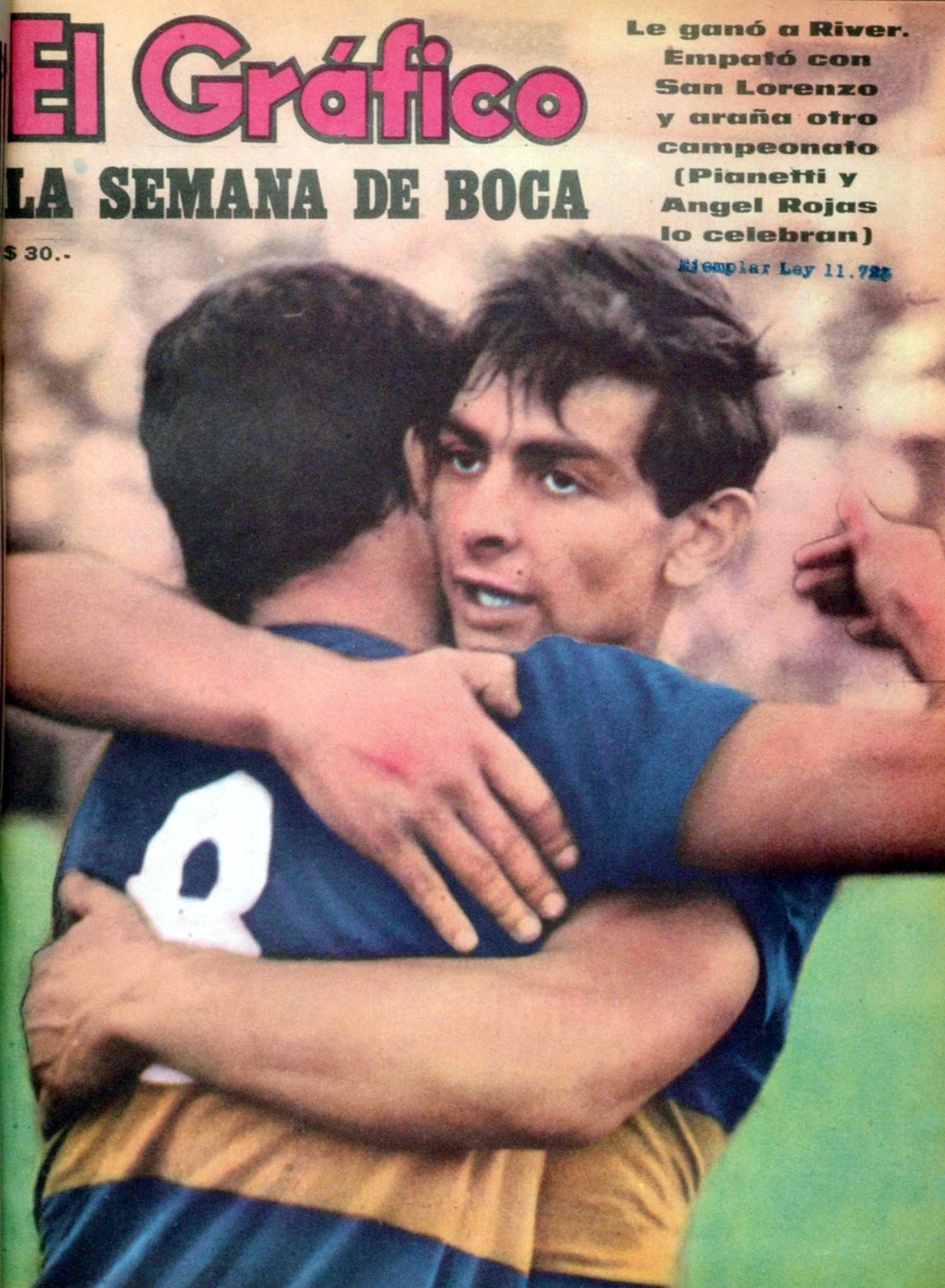 El Grafico del 14 de Diciembre de 1965. Edicion 2410